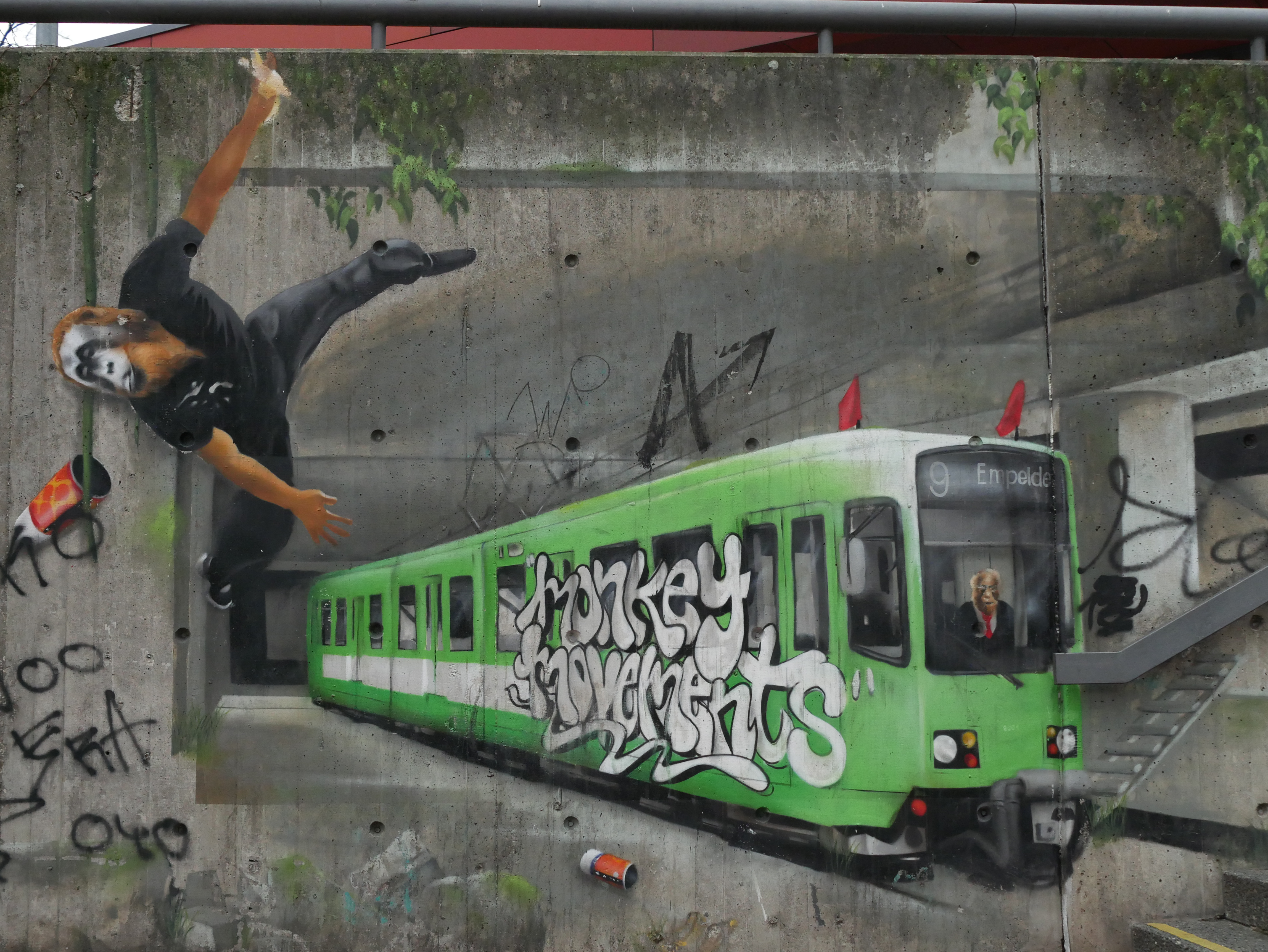 Straßenbahn Modell TW 6000 Graffiti Trompe-l’œil von Philipp von Zitzewitz, Jascha Müller und Jonas Wömper